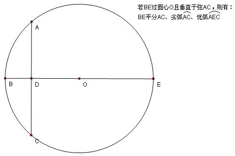 垂径定理说明（原创）